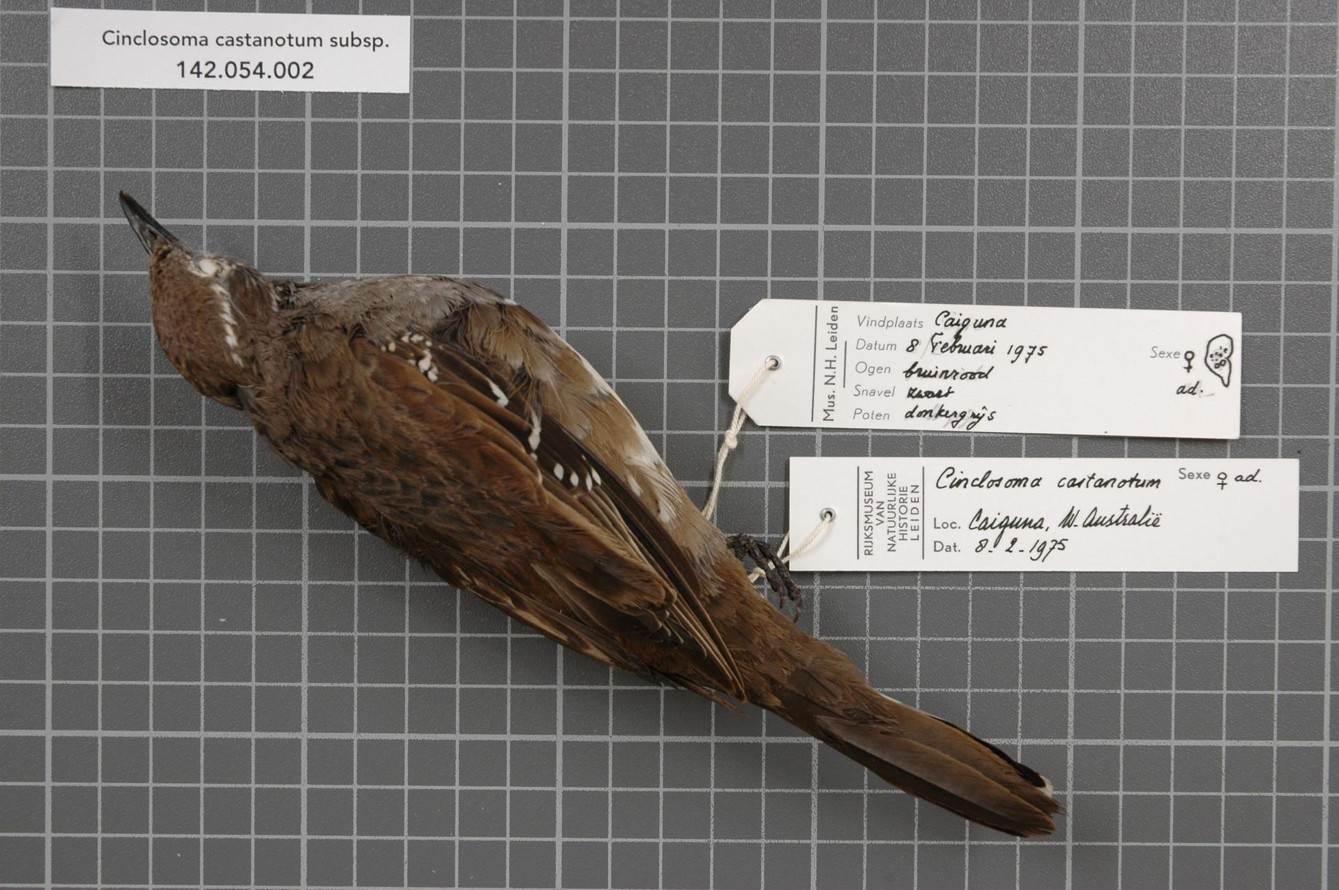 Cinclosoma castanotum subsp.